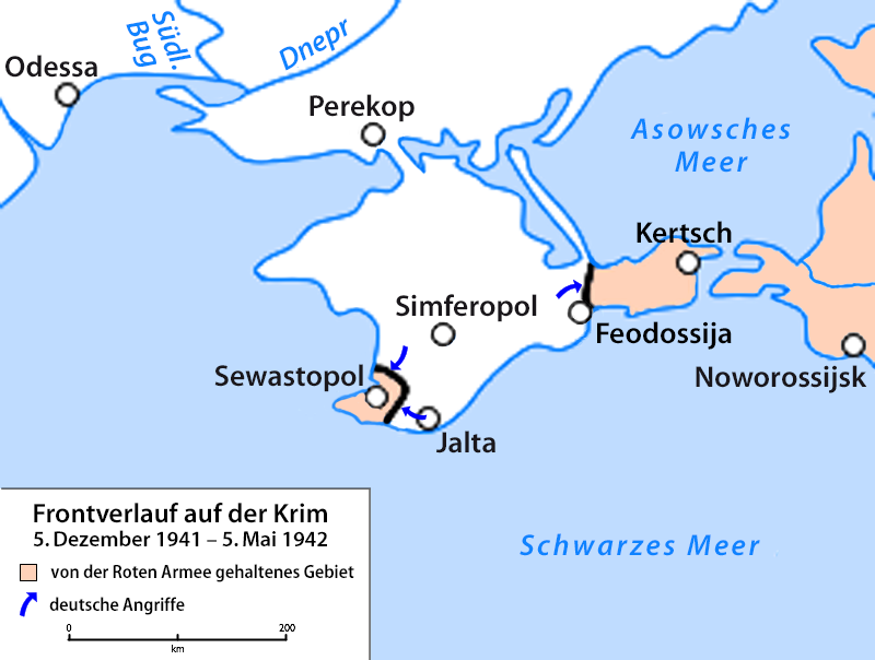 Frontverlauf auf der Krim 5. Dezember 1941– 5. Mai 1942